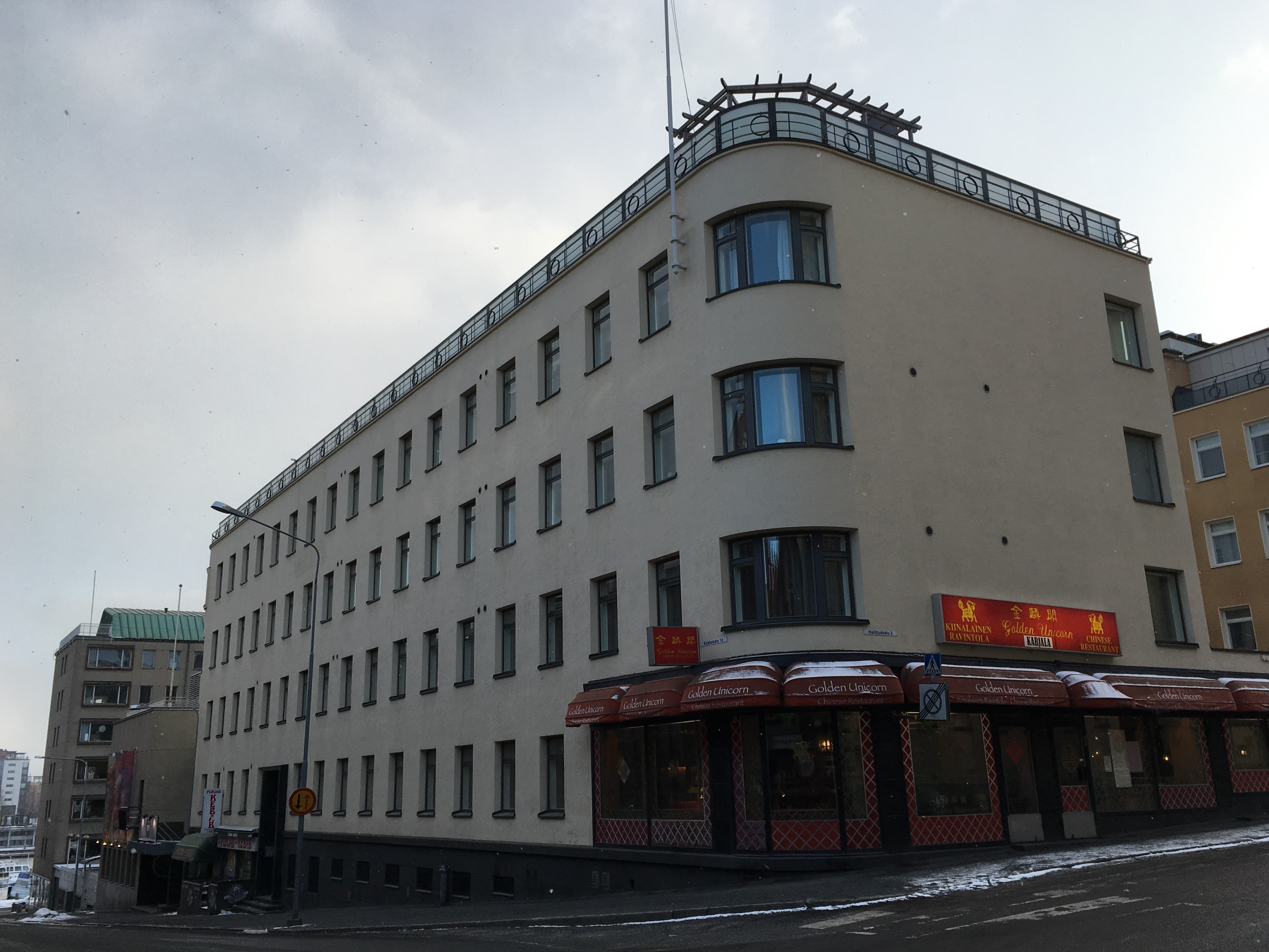 Arkkitehti Bertel Strömmerin suunnittelema Huberin talo Tampereen keskustassa. Kuvassa rakennuksen vanhin osa (1949), joka sijaitsee Kirkkokadun puolella.